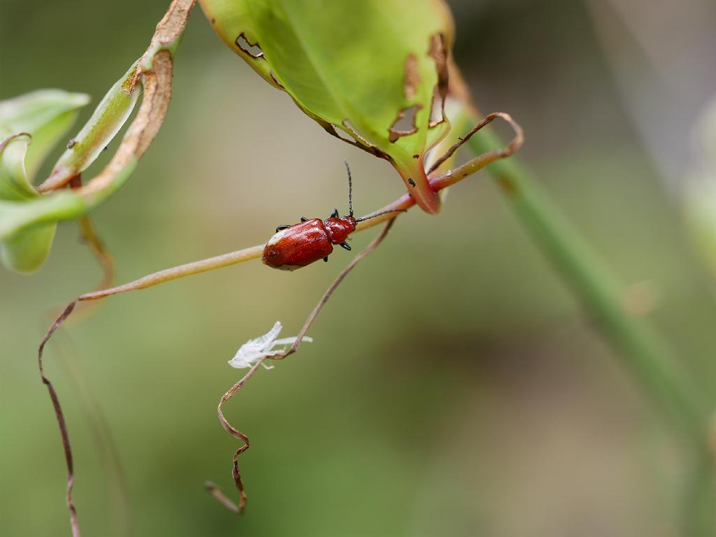 2019/05/19 和歌山県田辺市：Tanabe City. Wakayama Pref. Japan